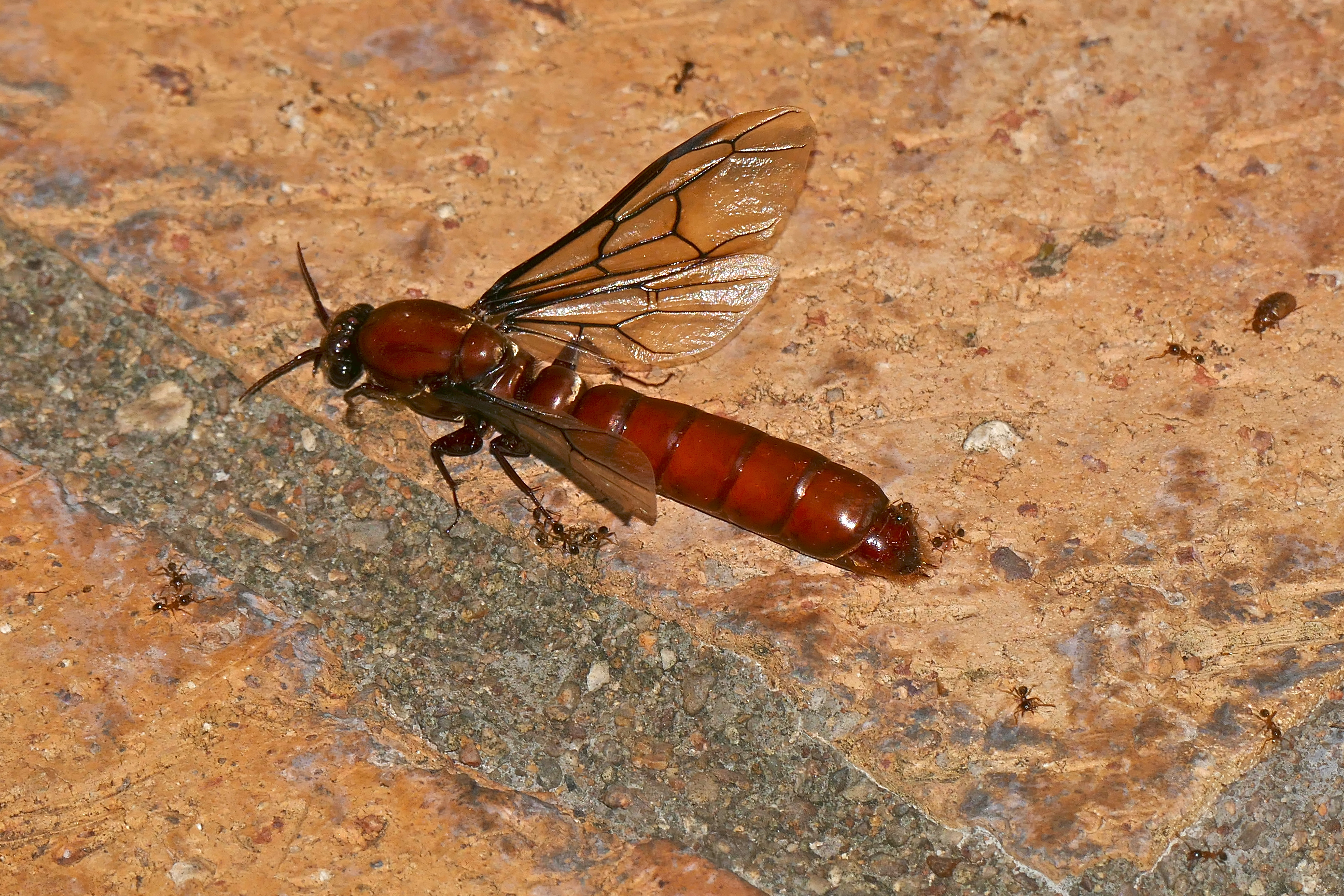 Berg-en-Dal Camp, Kruger NP, SOUTH AFRICA